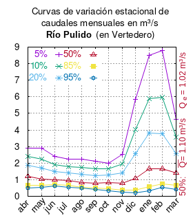 Curva de Variación Estacional del río Pulido en Vertedero. # cita publicación # | apellido = Dirección General de Aguas # | nombre = # | enlace-autor = Ministerio de Obras Públicas (Chile) # | título = Diagnóstico y clasificación de los cursos y cuerpos de agua según objetivos de calidad. Cuenca Río Pulido # | ubicación = Santiago de Chile # | editorial = Ministerio de Obras Públicas (Chile) # | año = 2004 # | edición = # | url = # | urlarchivo = # | fechaarchivo = # | ref = harv # Tabla 4.2 (m3/s) pág. 37 mes 5% 10% 20% 50% 85% 95% abr 2.910 2.385 1.875 1.183 0.671 0.481 may 2.887 2.245 1.684 1.040 0.667 0.557 jun 2.386 1.906 1.484 0.992 0.703 0.616 jul 2.245 1.803 1.408 0.936 0.648 0.558 ago 2.244 1.749 1.320 0.834 0.558 0.479 sep 2.100 1.645 1.244 0.777 0.502 0.420 oct 2.001 1.642 1.293 0.819 0.467 0.335 nov 2.517 1.939 1.414 0.773 0.367 0.237 dic 5.844 4.024 2.562 1.079 0.372 0.199 ene 8.484 5.906 3.809 1.647 0.587 0.320 feb 8.777 5.966 3.779 1.672 0.739 0.526 mar 4.632 3.556 2.581 1.400 0.659 0.423 This plot was created with Gnuplot.